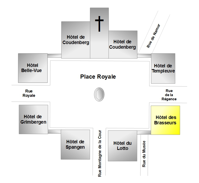 Belgique - Bruxelles - Plan de la place Royale - Hôtel des Brasseurs